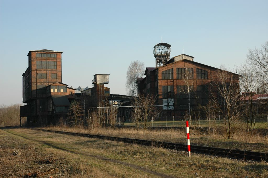 Důl Michal (coal mine), Ostrava, Czech Republic